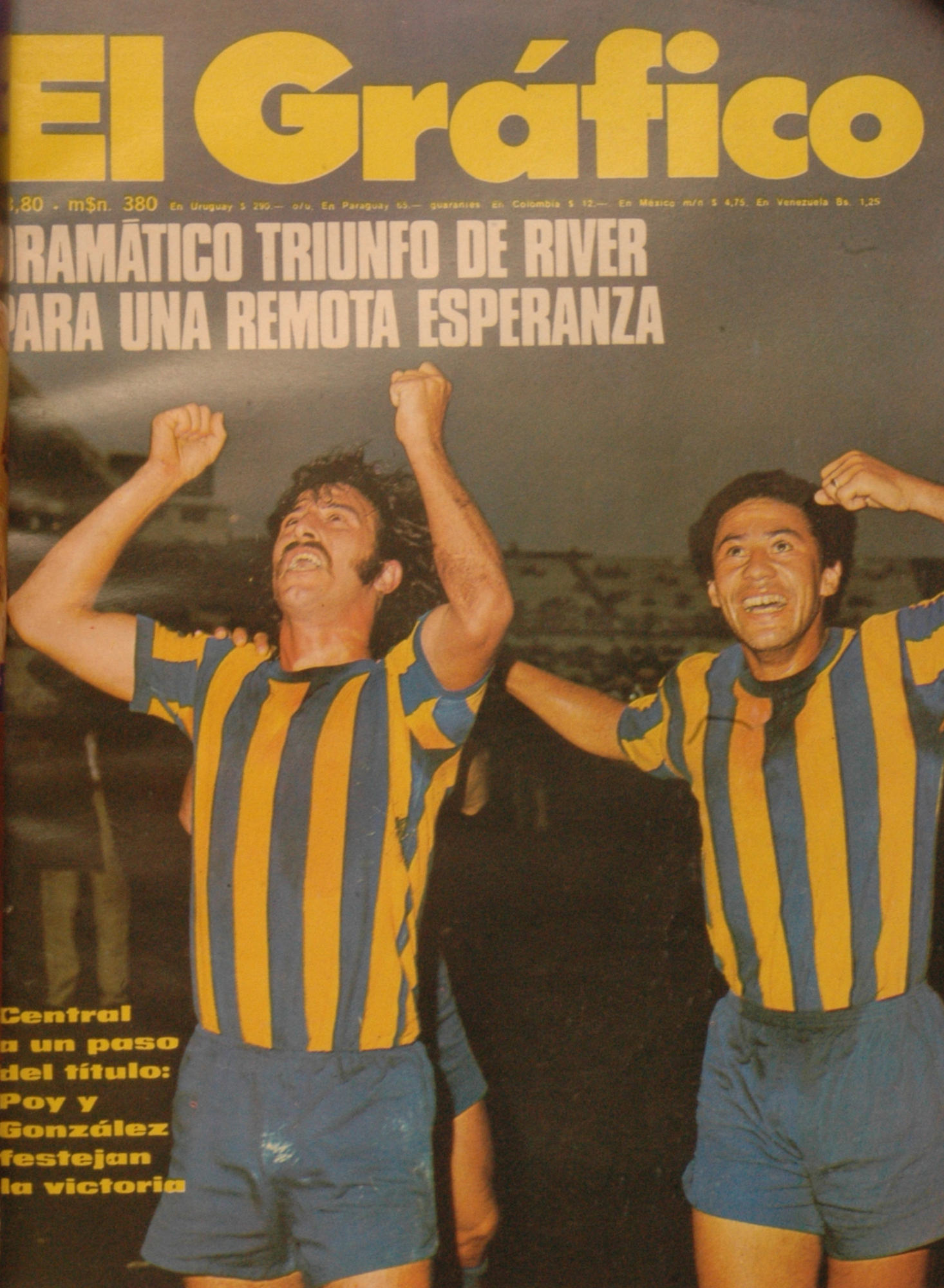 El Grafico del 25 de Diciembre de 1973. Edicion 2829